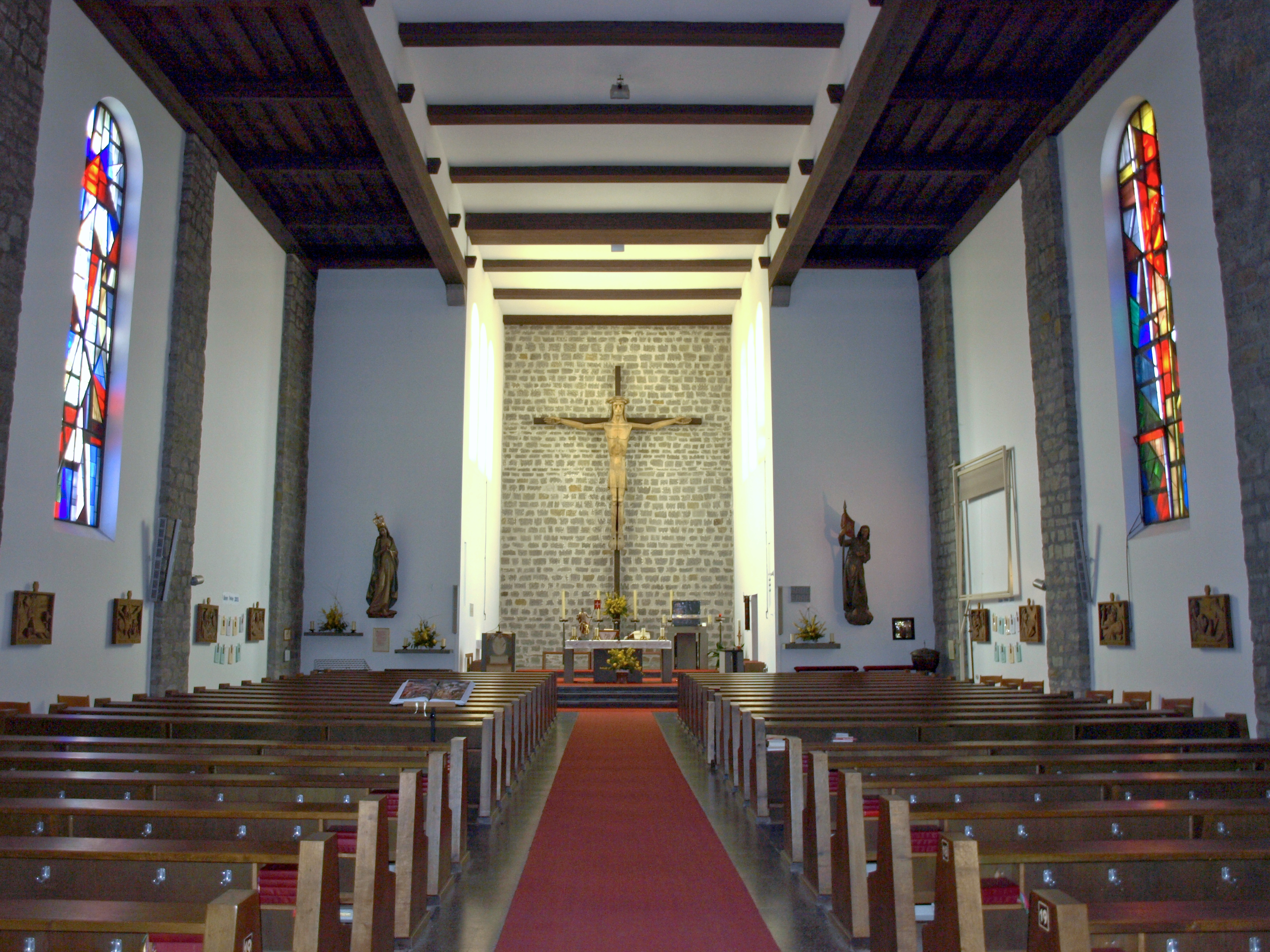 Kath. Pfarrkirche Vestenthal